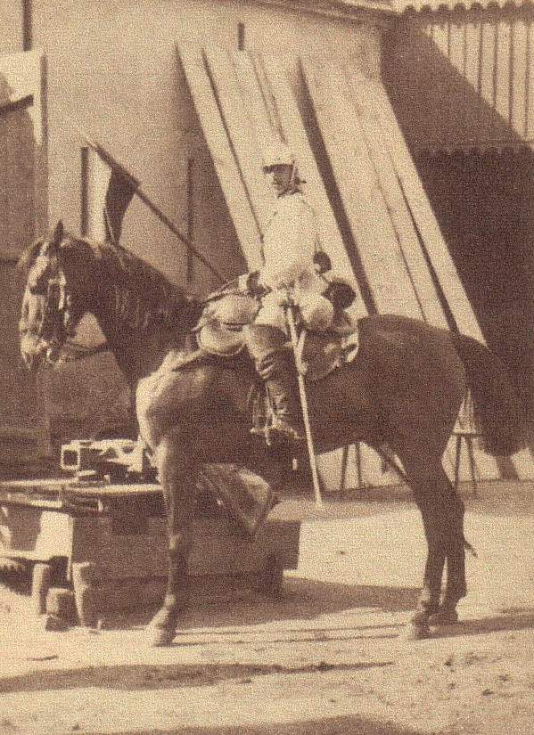 Albrecht von Thaer, Leibkürassierregiment